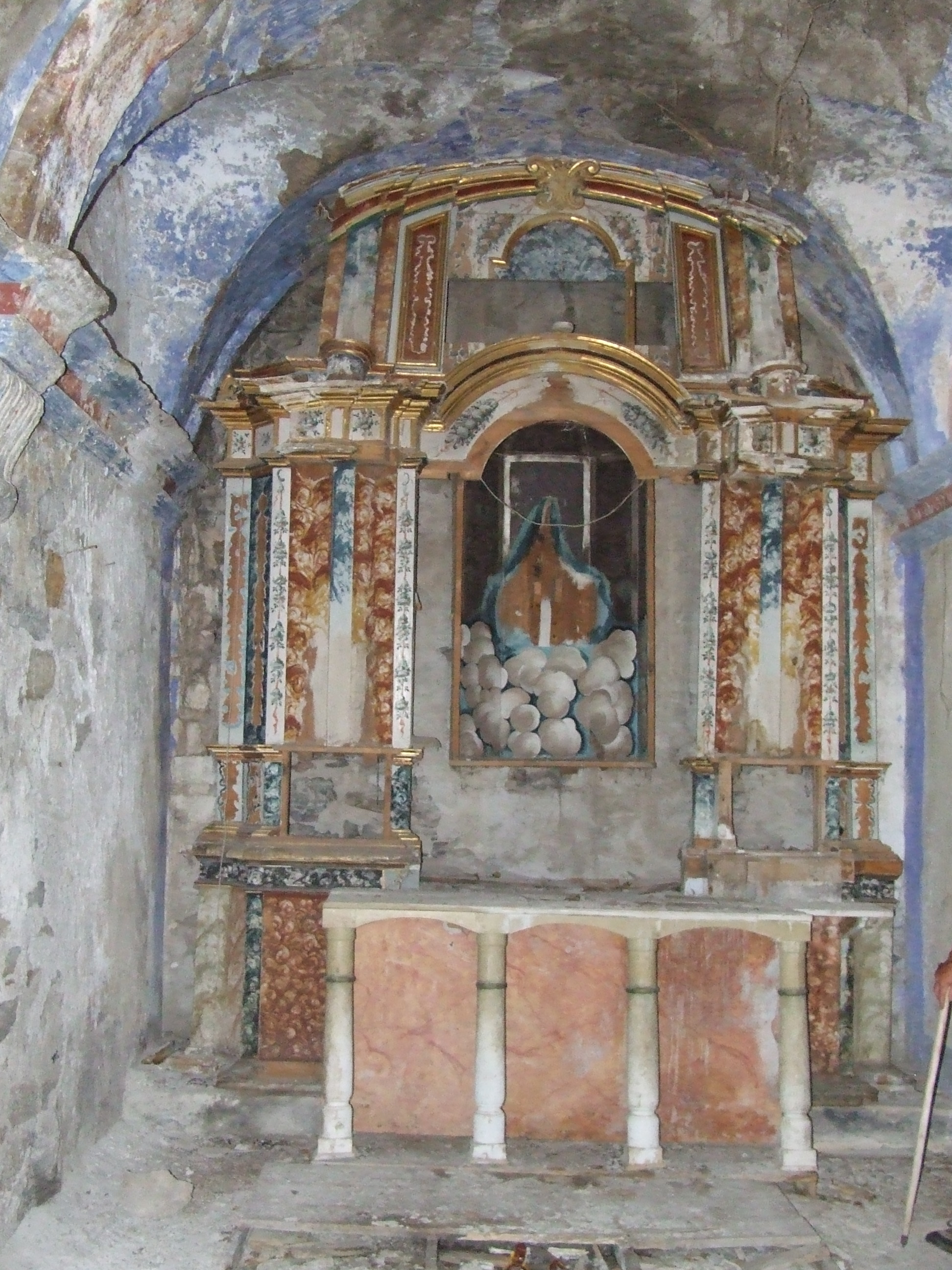 Altar major de Santa Maria d'Erillcastell (Malpàs, el Pont de Suert, Alta Ribagorça)